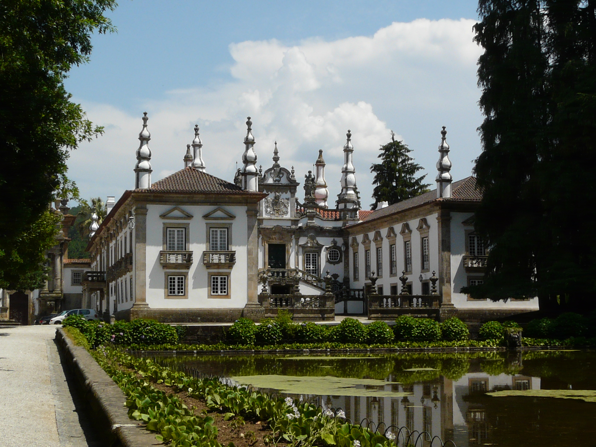 Palacio de Mateus